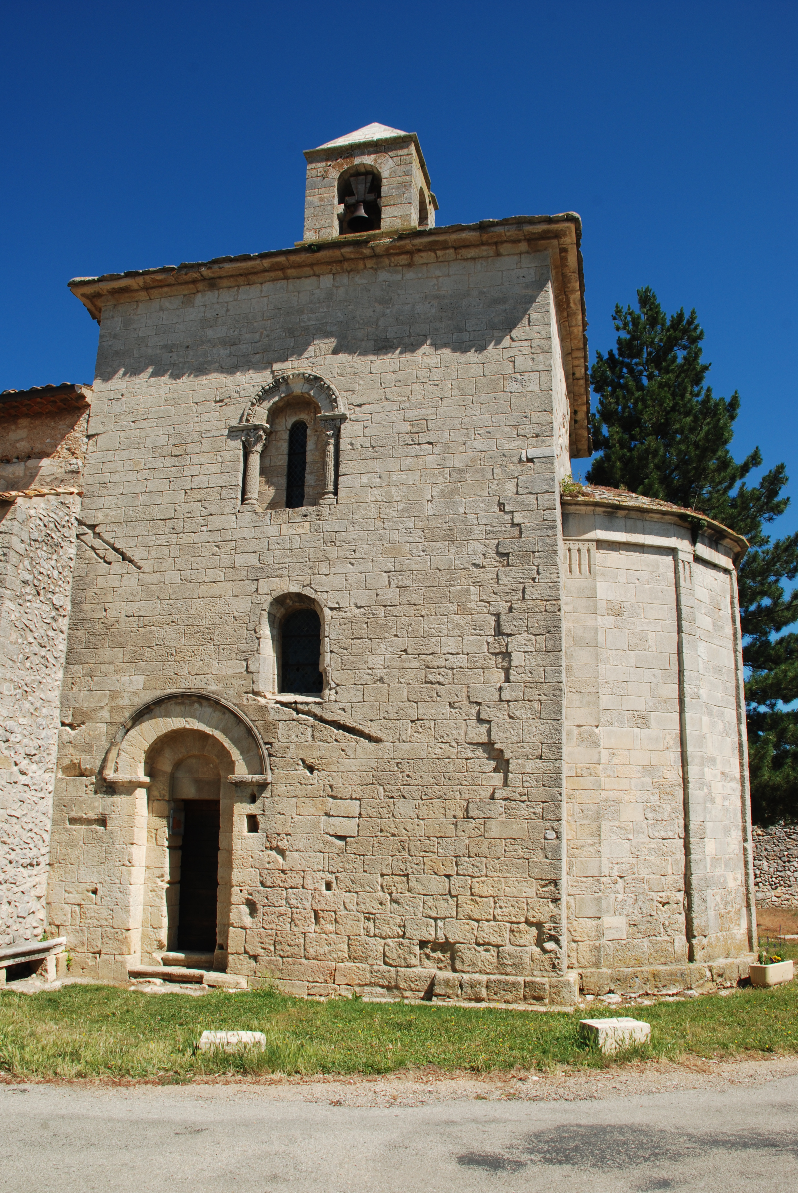 France - Provence - Église de Saint-Trinit